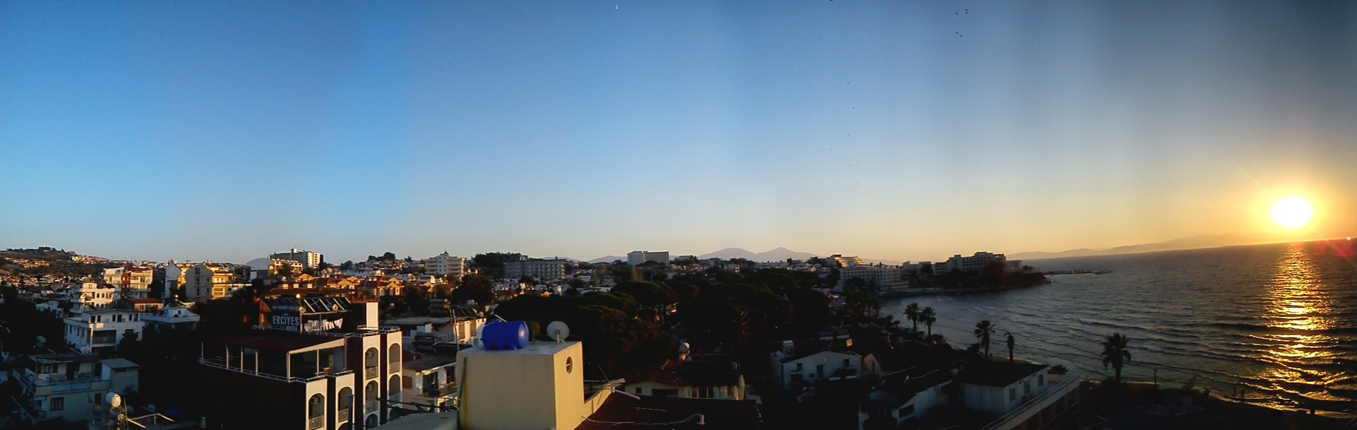 Ladies Beach in Kuşadası